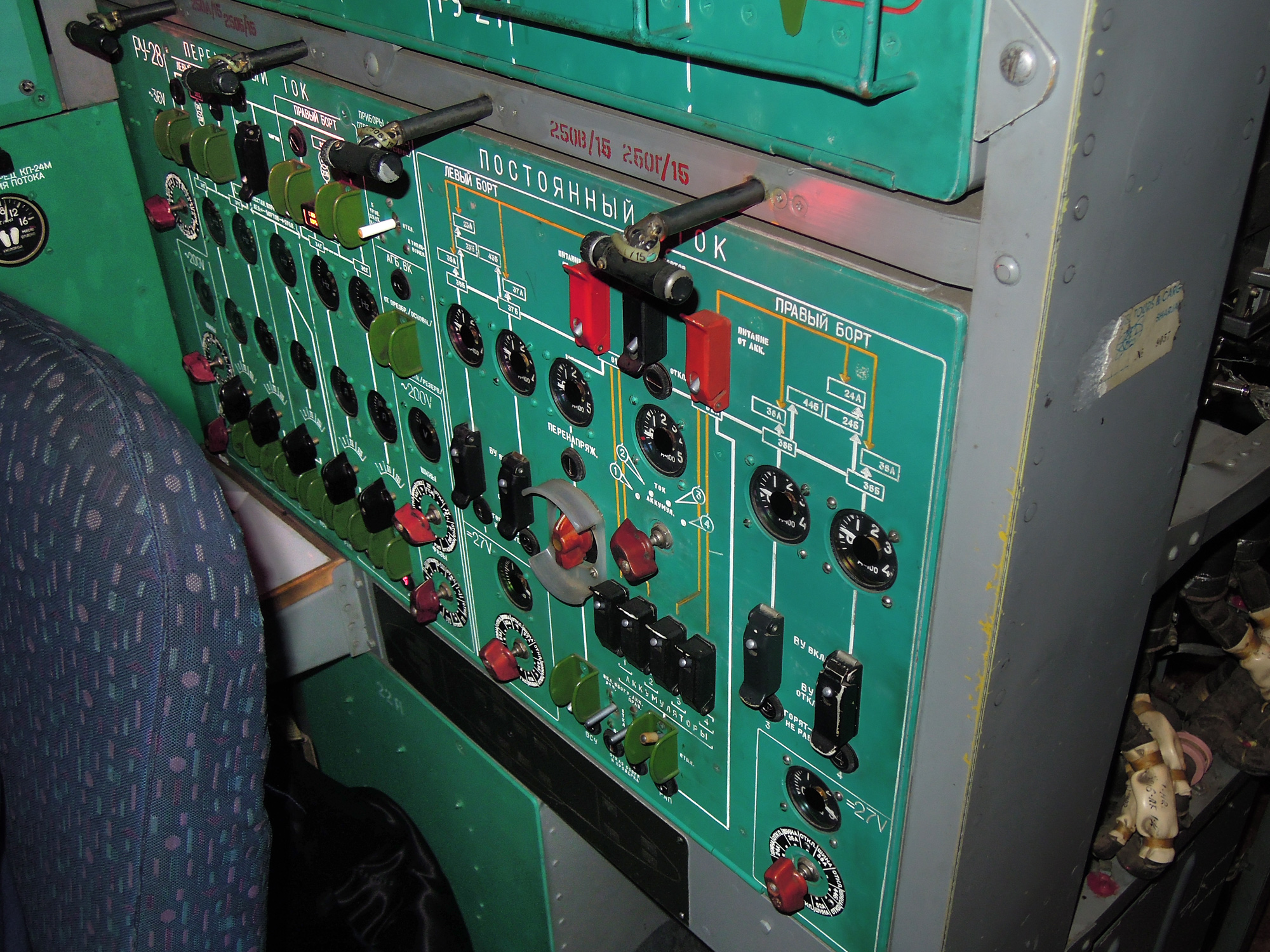 Panel of electrican aviator, russian jet Il-76